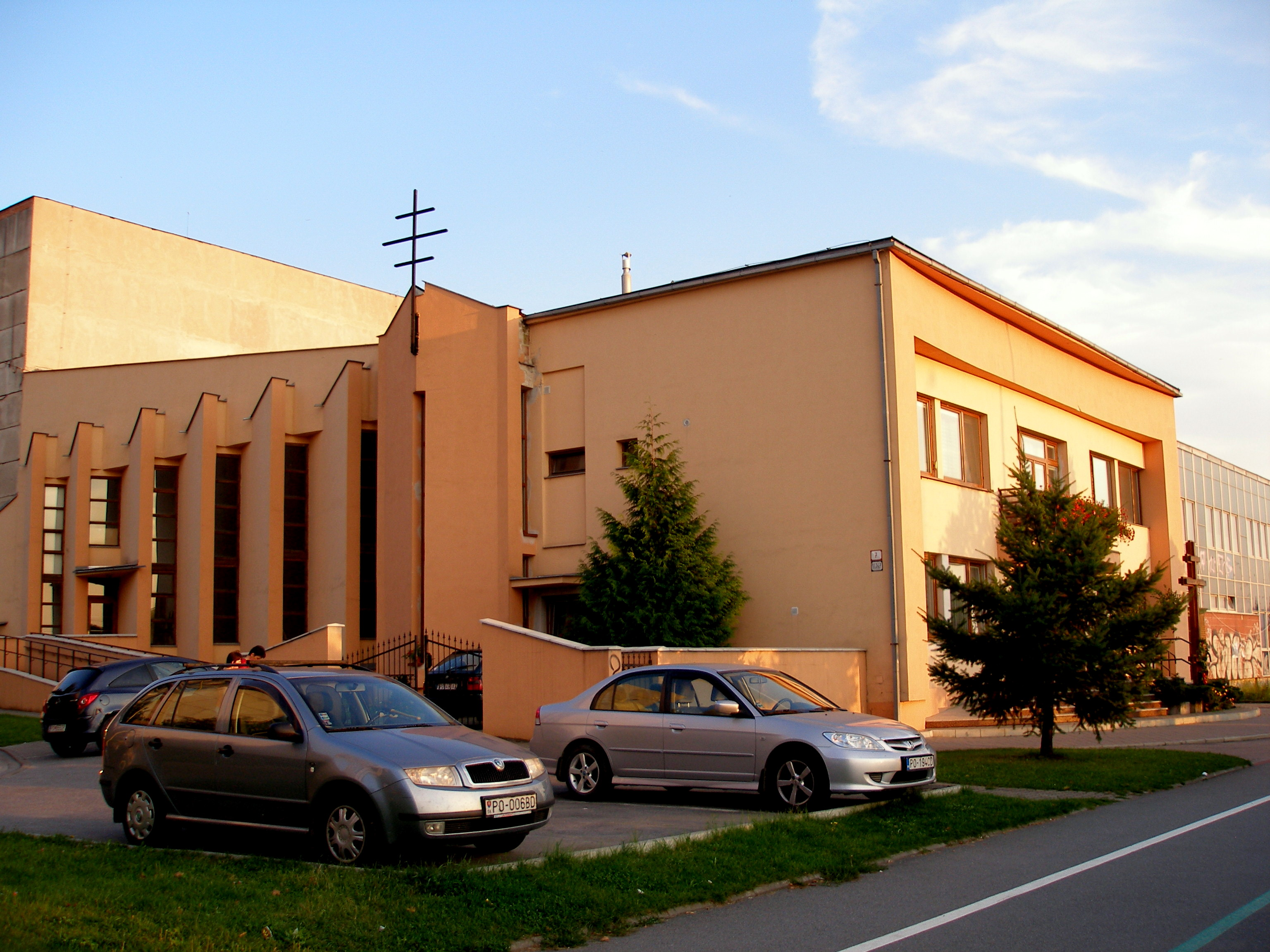 Ulica Armádneho generála Svobodu v meste Prešov - Sekčov